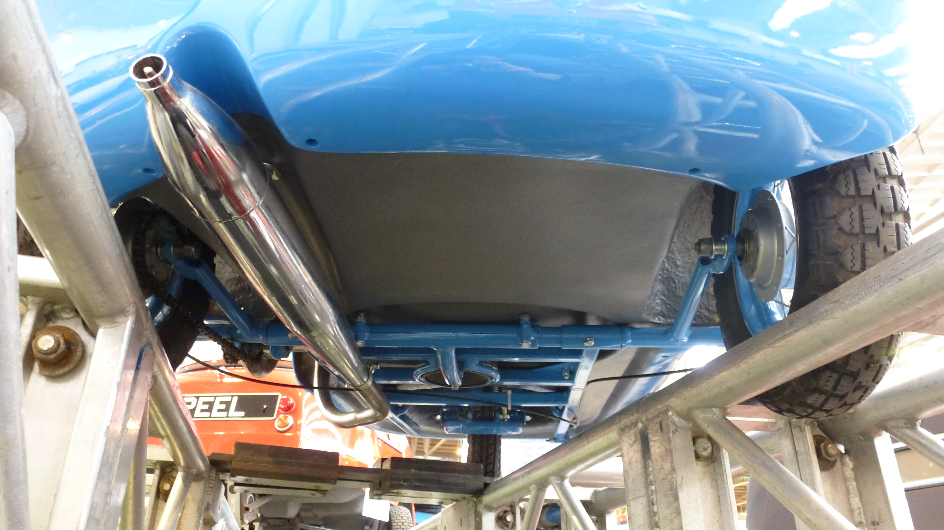 Mopetta GmbH Mopetta Nachbau von Andy Carter